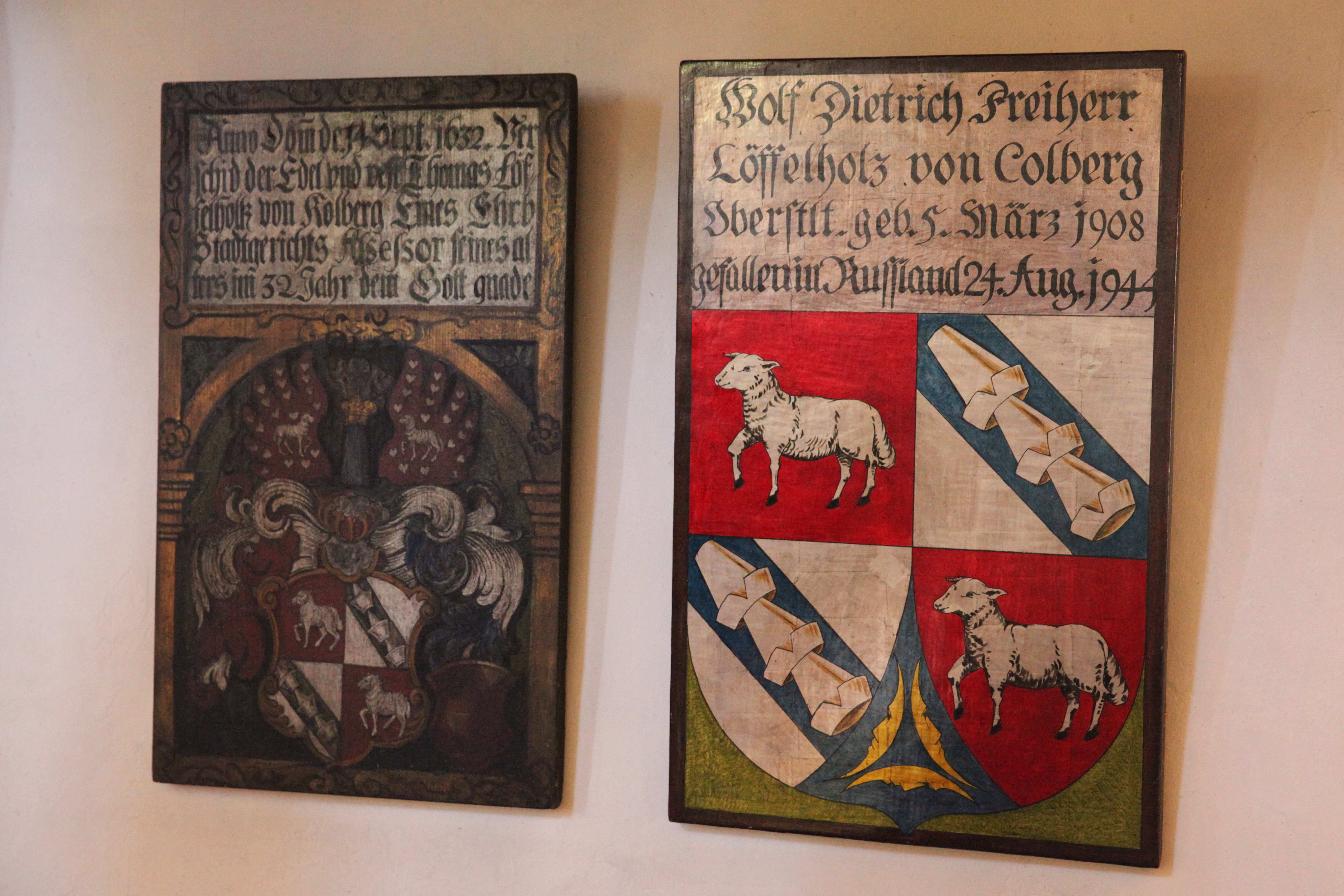 evangelisch-lutherische Kirche St. Pankratius in Schottenstein, Itzgrund